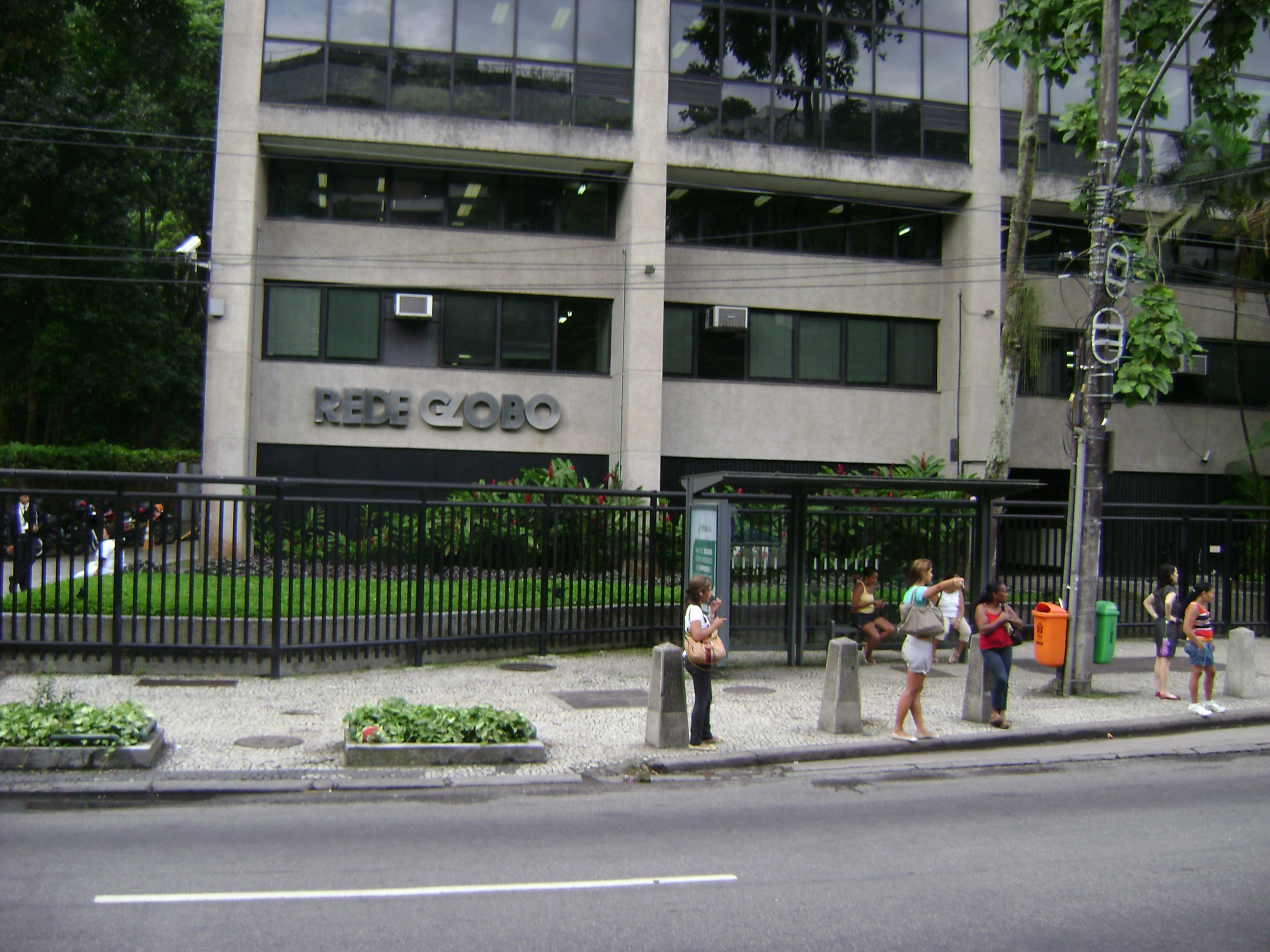 Prédio da Rede Globo, na cidade do Rio de Janeiro, Brasil.